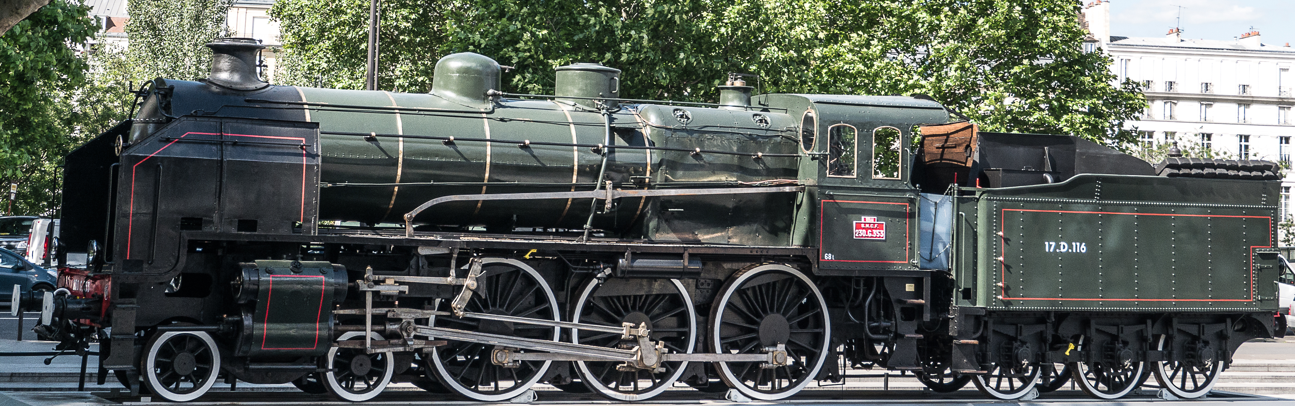 Il était une fois l'Orient Express, Exposition à l'Institut du Monde Arabe du 4 avril au 31 août 2014.